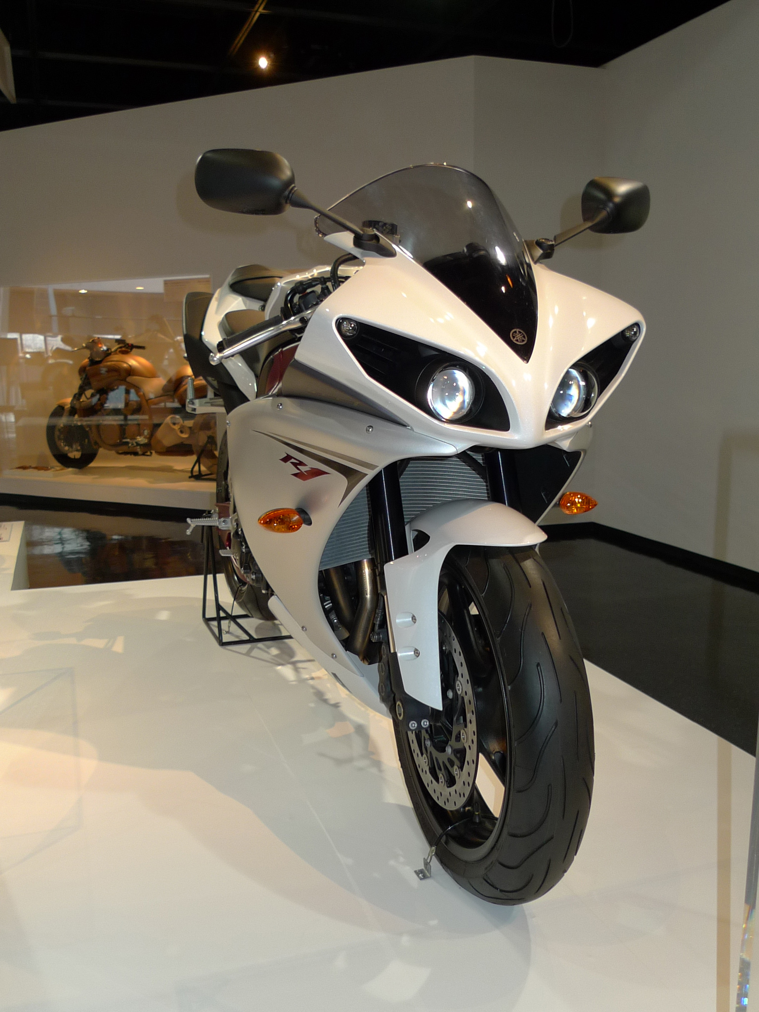 ヤマハ・YZF-R1 2010 前面 ヤマハコミュニケーションプラザにて撮影